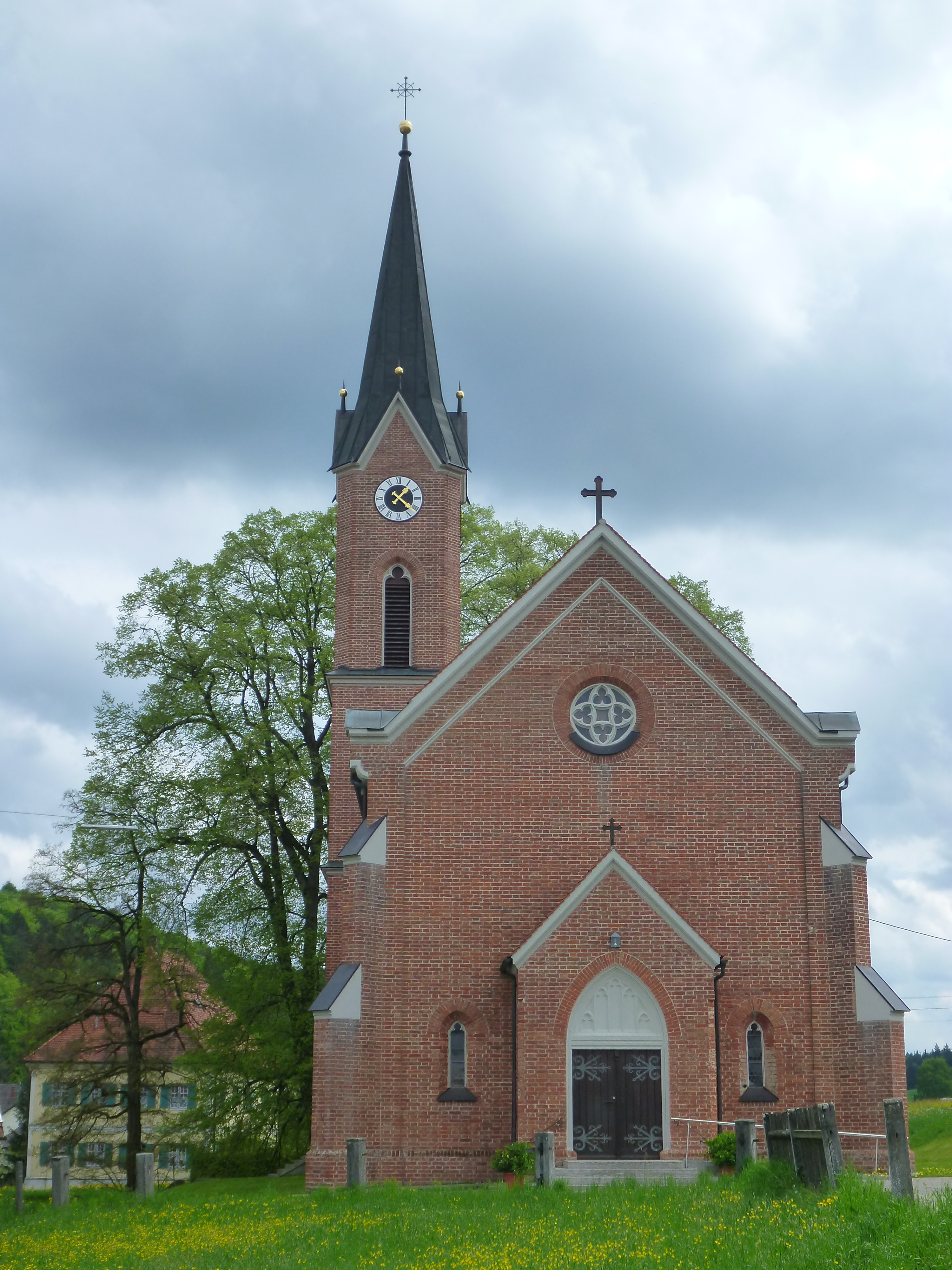 Katholische Pfarrkirche St. Georg, Westseite